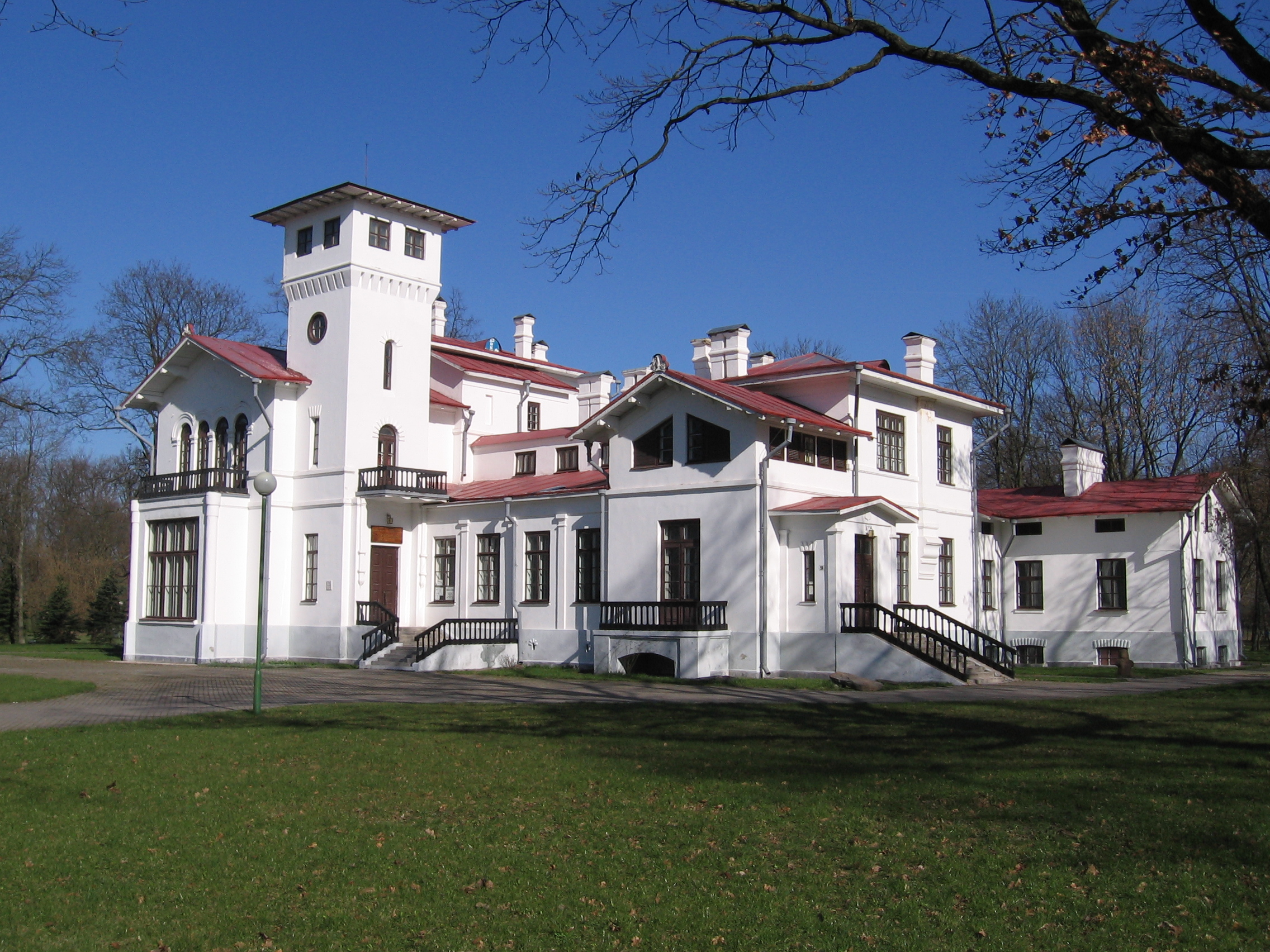 Беларуская (тарашкевіца): Пружанскі палацык. Вясна. This is a photo of Belarusian heritage monument. Reference number: 112Г000585 ( WLM)